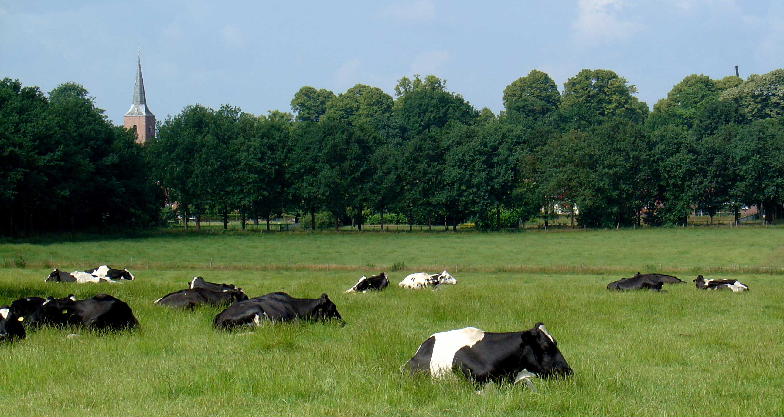 Zicht op Gieten, vanaf de Hondsrugweg gezien